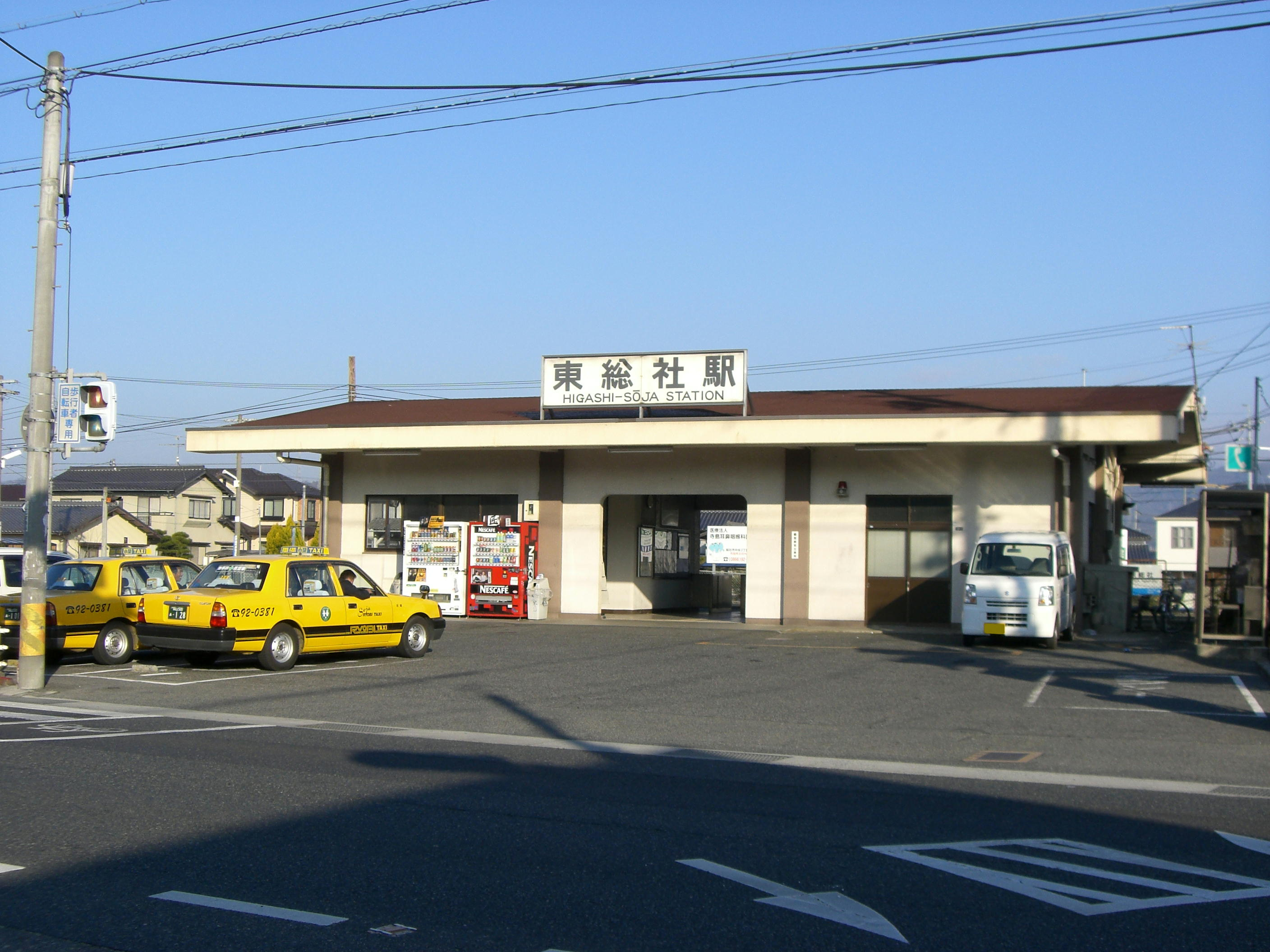 西日本旅客鉄道（JR西日本）吉備線 東総社駅の駅舎